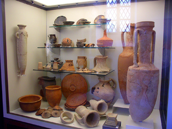 Terni (Umbria - Italy): Alcuni reperti conservati nel museo archeologico